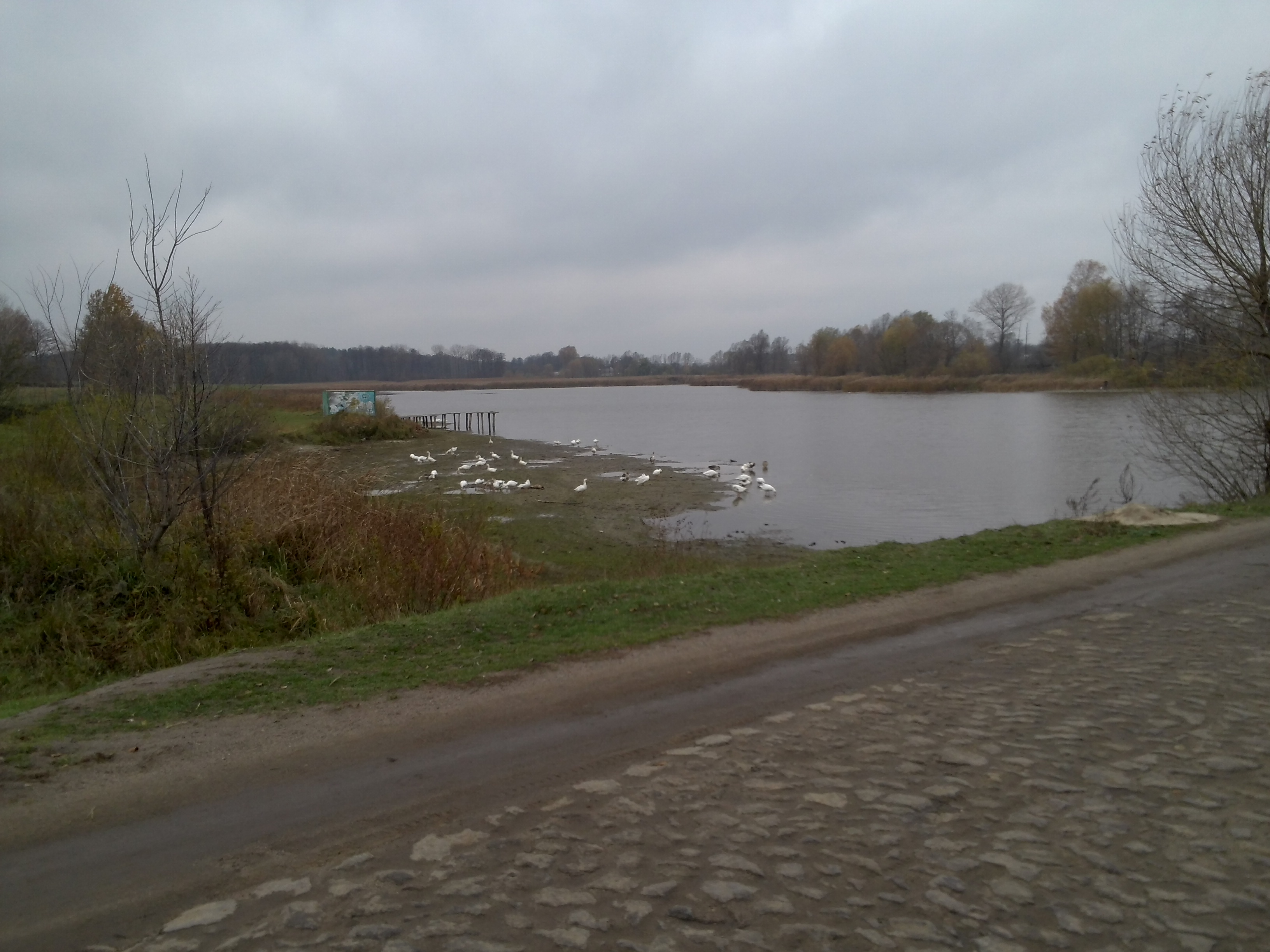 с. Косаківка. Ставок на межі з селом Коханівка